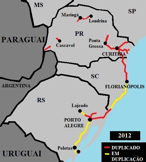 Rodovias duplicadas, ou em duplicação, da Regiao Sul do Brasil, em 2012